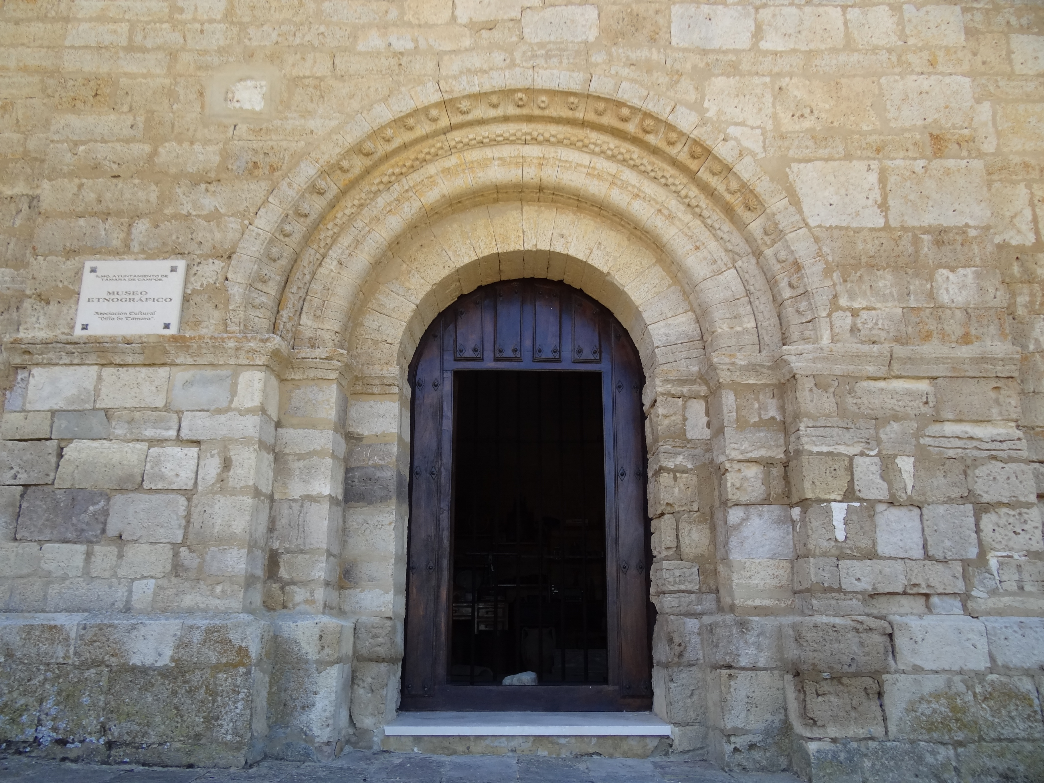 Támara de Campos (Palencia, España). Sede del Ayuntamiento en el edificio románico que fue la iglesia de la Orden de San Juan de Jerusalén.Puerta románica por la que se accede a la estancia dedicada a museo etnográfico.